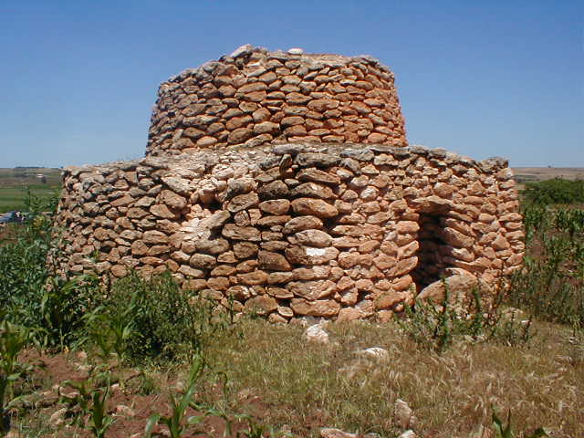 Walon: Tazota a Laabidate